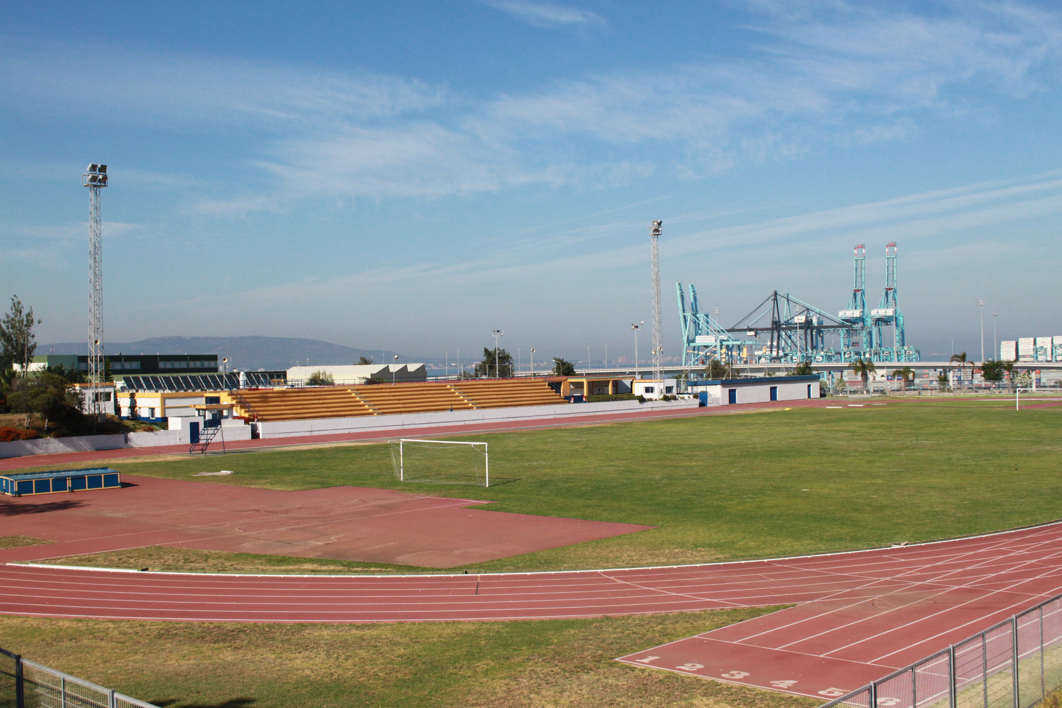 Polideportivo municipal de Algeciras, Andalucía, España.